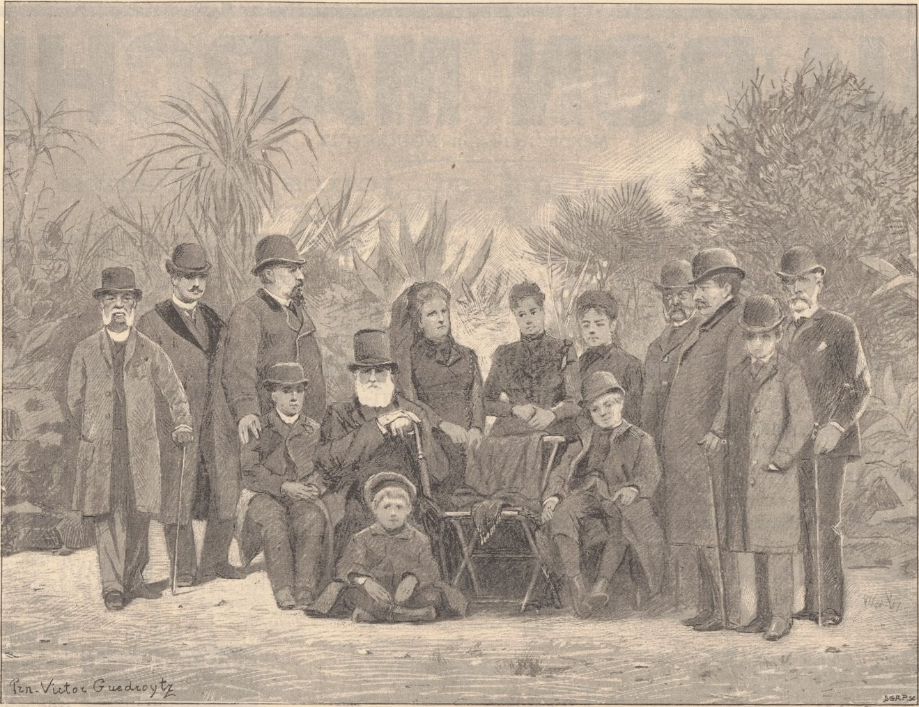 L'Empereur du Brésil et sa famille a Cannes (Dessin de M. le prince Victor Guedroytz): 1. Comte d'Aljezur. — 2. D. Pedro de S.-C.-Gotha. — 3. Comte d'Eu. — 4. Prince D. Pedro de Graô Para. — 5. L'Empereur. — 6. D. Antonio. — 7. Comtesse d'Eu. — 8. Baronne de Mirritiba. — 9. Baronne de Loreto. — 10.D. Luiz. — 11. Baron de Loreto. — 12. Comte de Motta Maia. — 13. Comte de Motta Maia fils. — 14. Baron de Mirritiba.